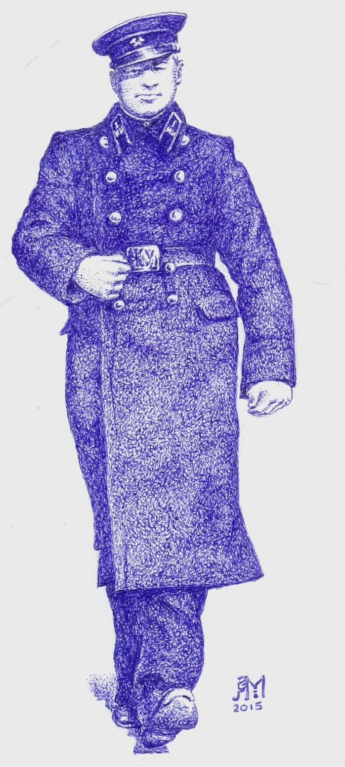 Учащийся Железнодорожного Училища (ЖУ ГУТР СНК СССР) в зимней форме. Ленинград. 1941. (Эскиз)